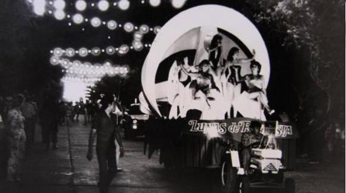 Vista del Carrusel del Sol desarrollado en el año 1972 en marco del Fiesta del Sol (actual Fiesta Nacional del Sol) en las calles de la Ciudad de San Juan, Argentina.